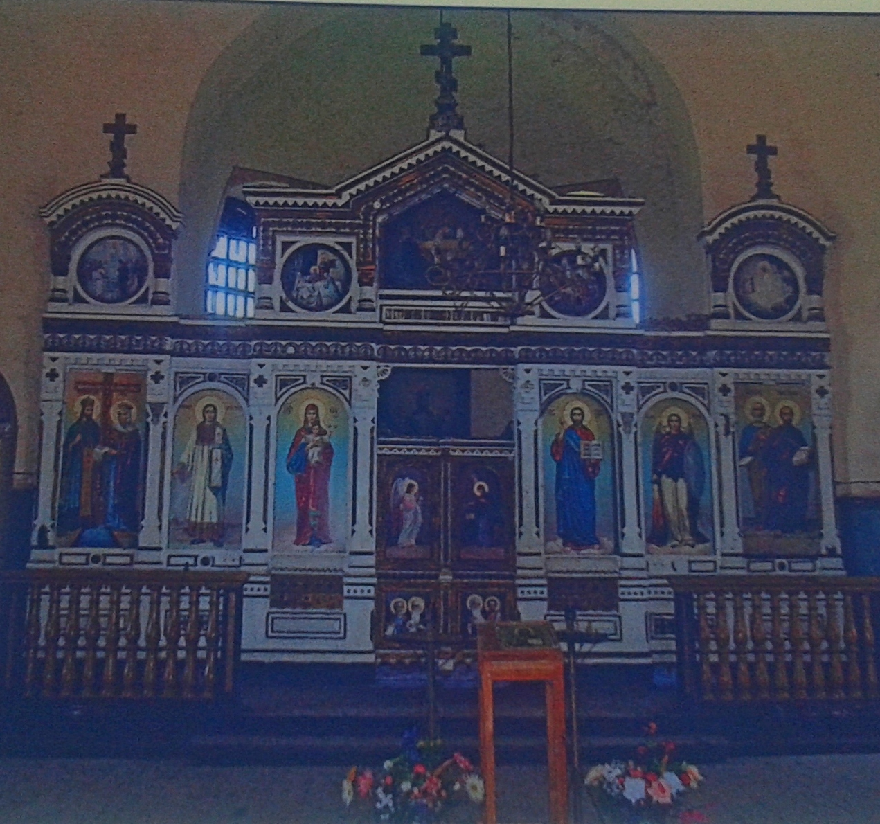 Ikonostas cerkwi w Sosnowicy - zdjęcie na tablicy informacyjnej przy świątyni